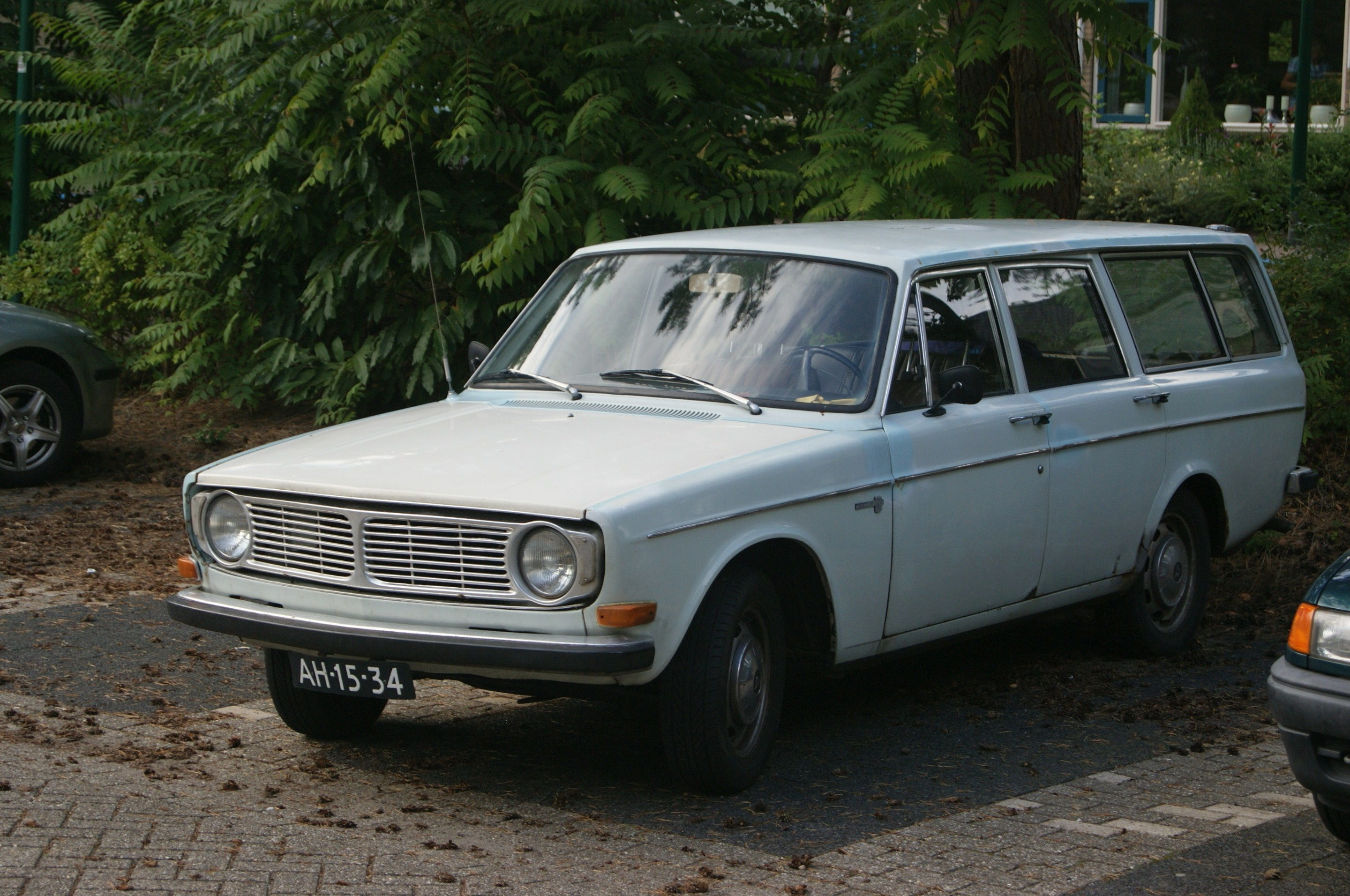 AH-15-34